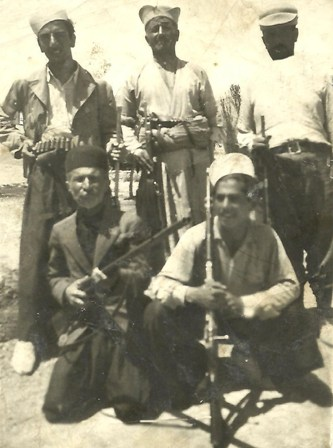 مشدی پلوری در کنار پسرش حسین (نقل از کتاب عقاب کوهستان نوشته محمدرضا گودرزی)